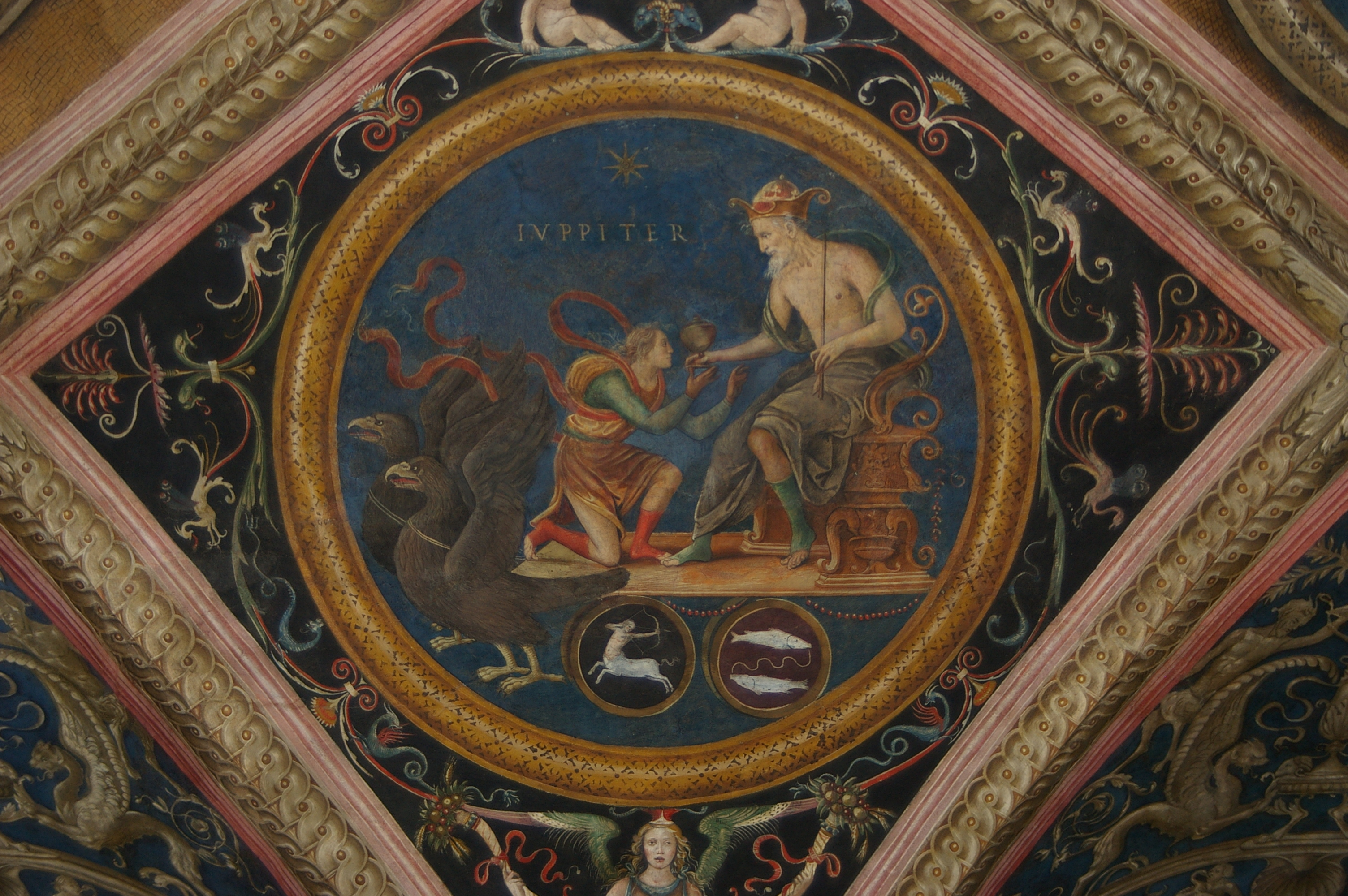 Perugino, volta del Collegio del Cambio, affresco di Giove, con Ganimede in figura di Coppiere/Acquario.